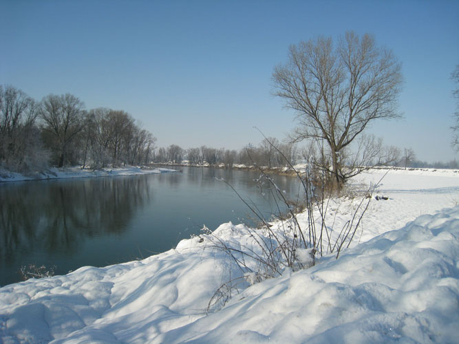 Scorcio del fiume Adda nel gennaio 2009 dopo un'abbondante nevicata